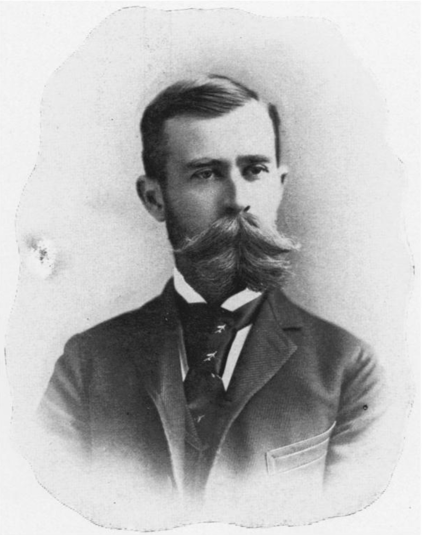 american ornithologist Walter E. Bryant